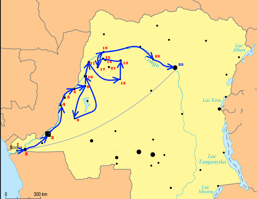 Circuit intégral effectué par la commission d'enquête sur les exactions commises dans l'Etat indépendant du Congo en 1904